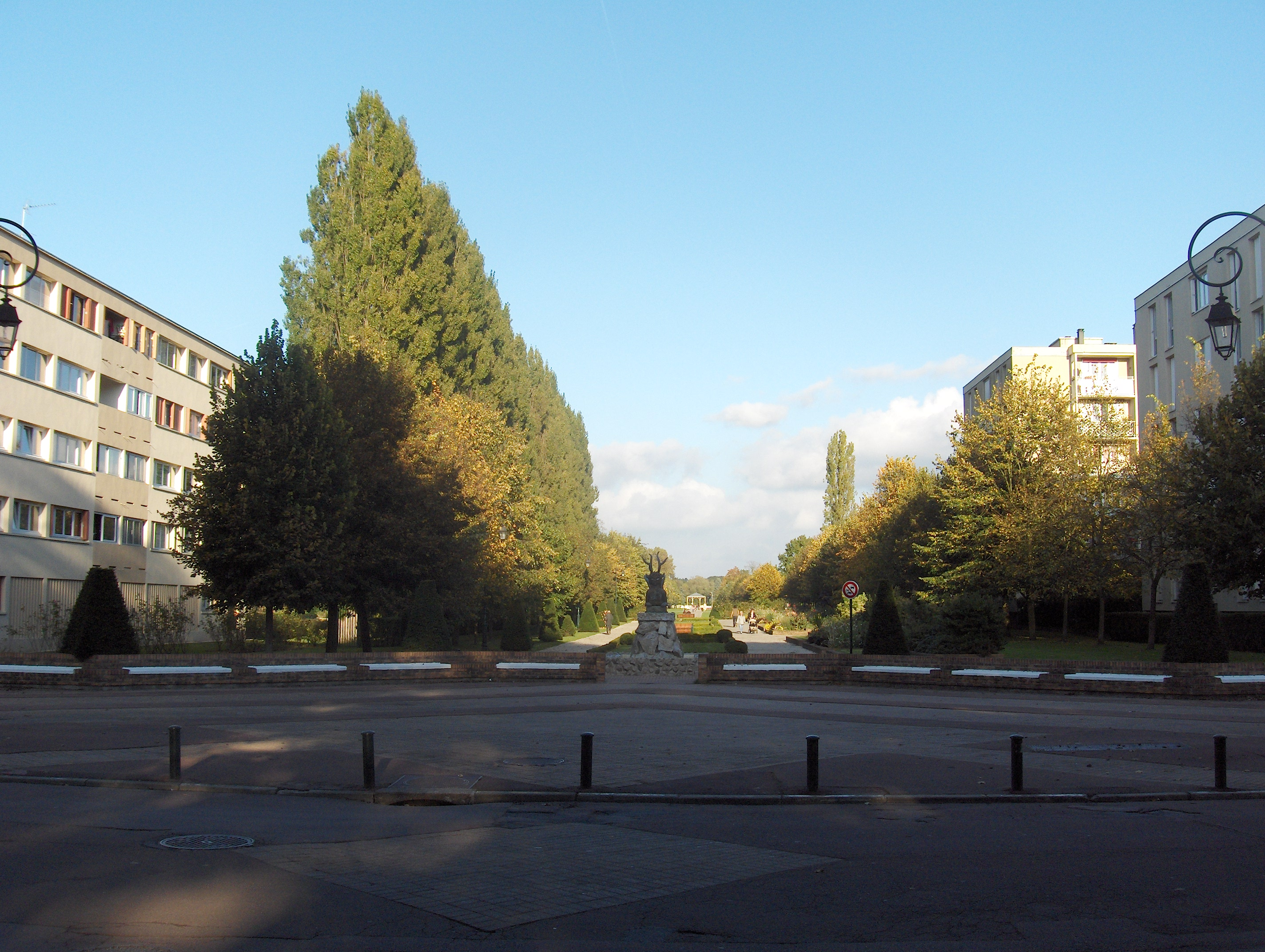 Logements collectifs et perspective de l'allée verte à L'Isle-Adam (Val-d'Oise)